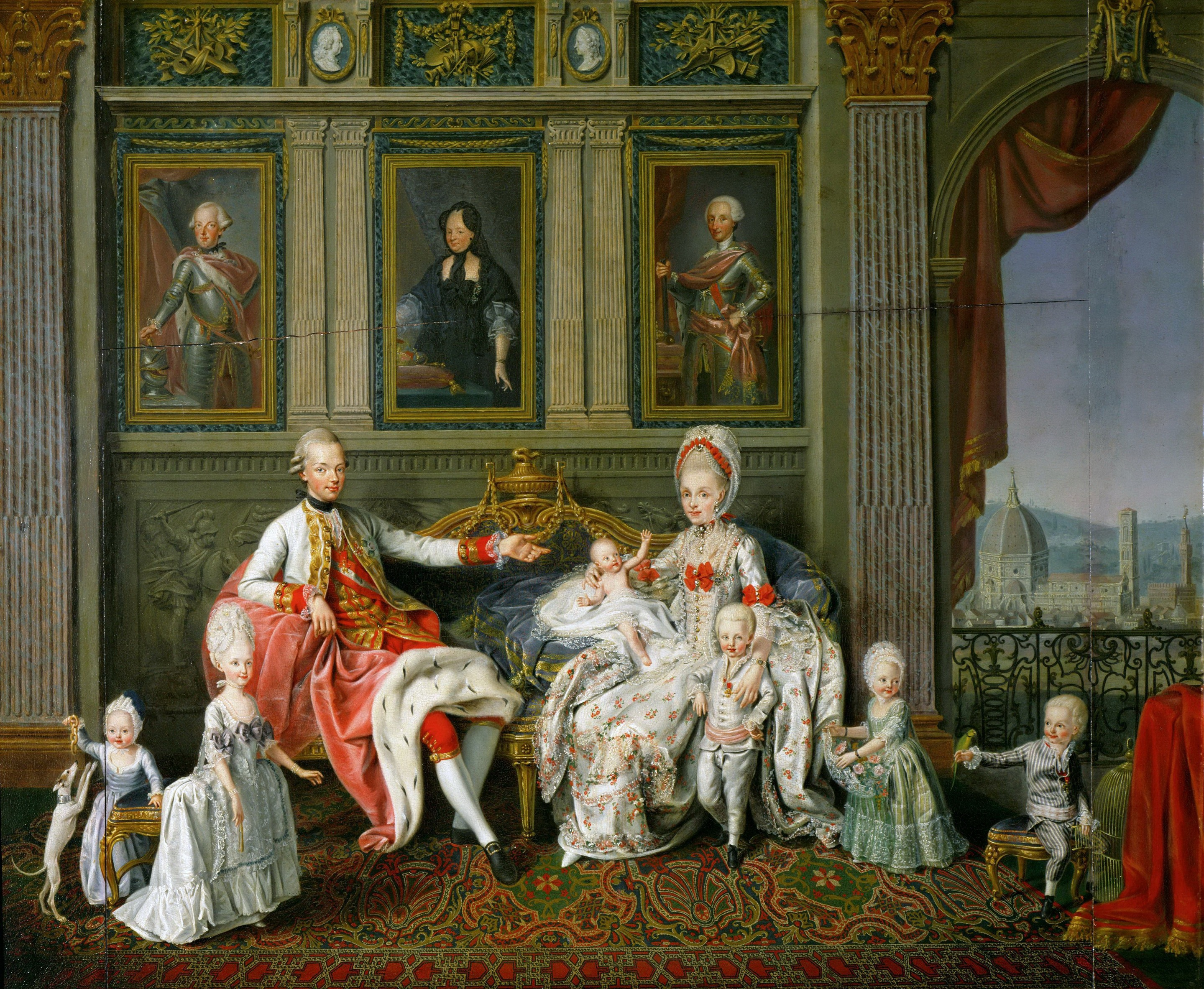 Abgebildete Personen: Kaiser Leopold II. Sohn des Franz I. Stephan Habsburg Österreich, Kaiserin Maria Ludovica di Carlo di Bourbon Sizilien, Erzherzogin Maria Theresia Tochter d. Leopold II. von Habsburg Österreich, Kaiser Franz I. (II.) Sohn des Leopold II. von Habsburg Lothringen, Großherzog Ferdinand IV. Sohn des Leopold II. von Habsburg Lothringen, Erzherzogin Maria Anna Tochter d. Leopold II. von Habsburg Österreich, Erzherzog Karl Sohn des Leopold II. von Habsburg Lothringen Österreich, Erzherzog Leopold Sohn des Leopold II. von Habsburg Lothringen